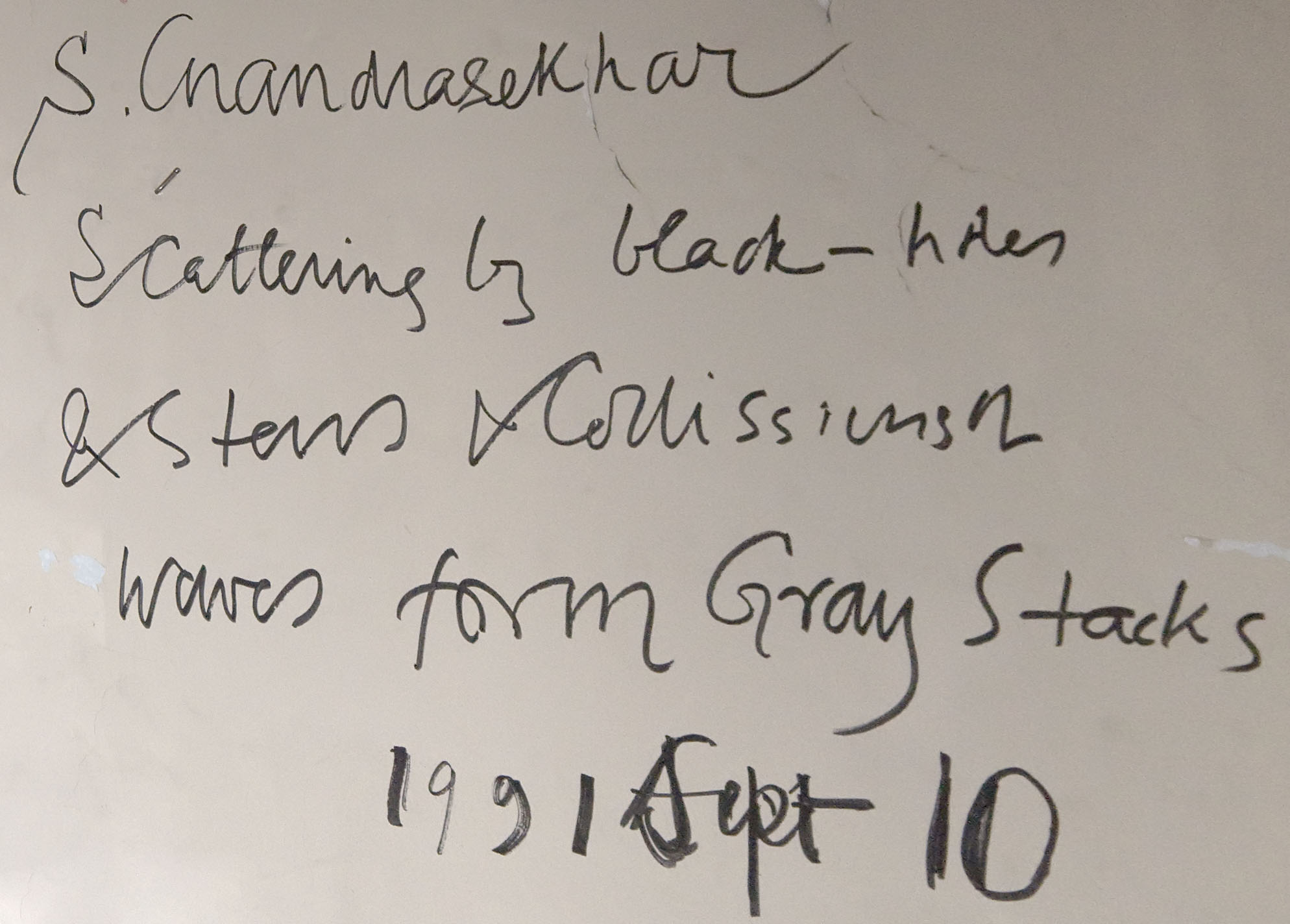 Роспись С. Чандрасекара на стене G9 — комнаты группы релятивистской астрофизики Римского университета «Ла Сапиенца» (1991)